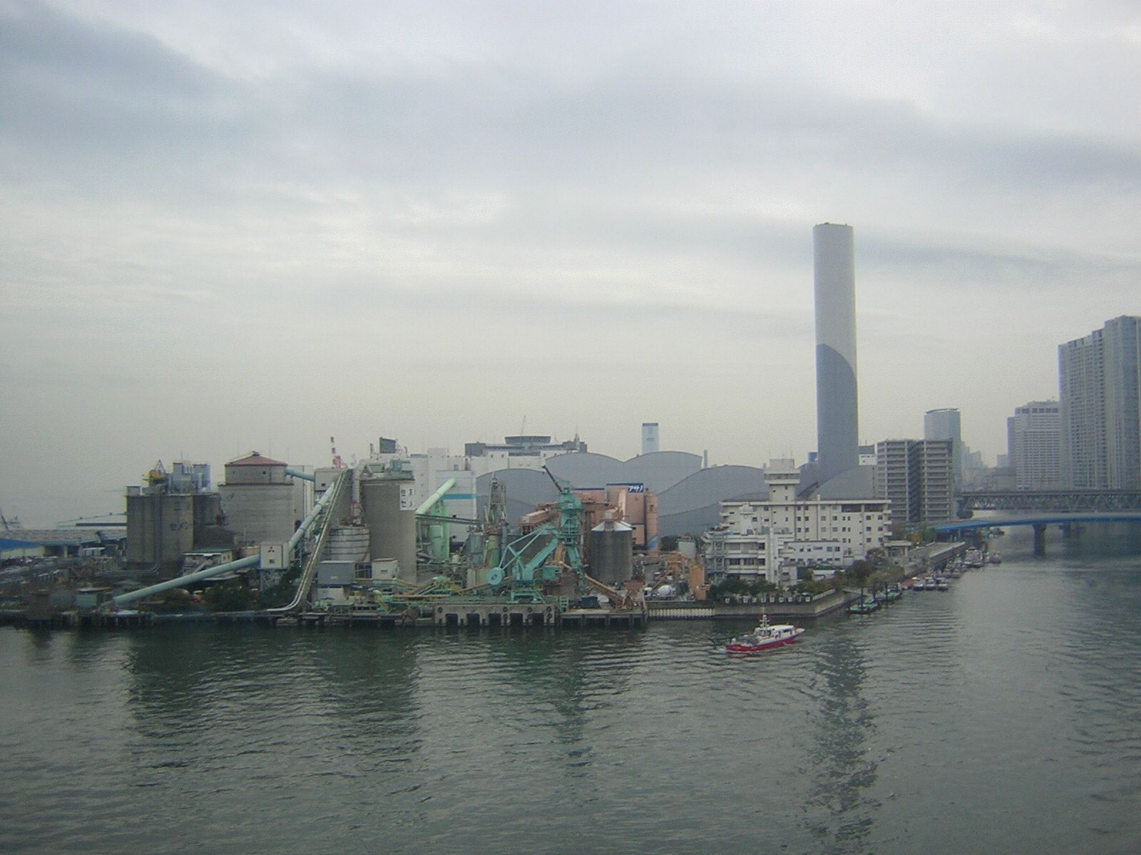 Tokyo, Japan